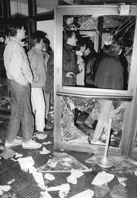 Berlin, Stürmung Stasi-Zentrale ADN-ZB Zimmermann 15.1.90 Berlin: Demonstration- Das Neue Forum hatte zu einer Demonstration vor die ehemalige Zentrale des Amtes für Nationale Sicherheit in Lichtenberg aufgerufen. Die Mehrzahl der vielen Tausenden ließ sich zu einem Akt des Vandalismus hinreißen. Demonstranten stürmten den Gebäudekomplex, drangen in Büroräume ein und verwüsteten sie. Nach Augenzeugenberichten zerfledderten sie Unterlagen und warfen Mobiliar aus dem Fenster.